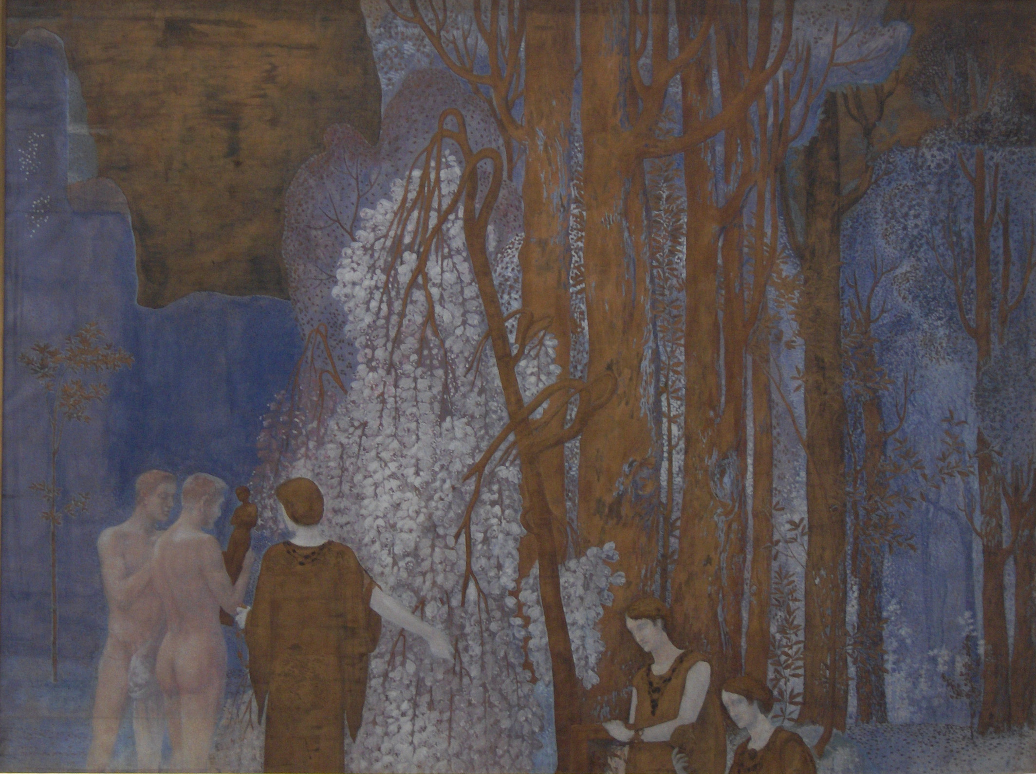 "De boot van het ideaal" door de Belgische kunstschilder Constant Montald (1862-1944); verzameling van de provincie Henegouwen